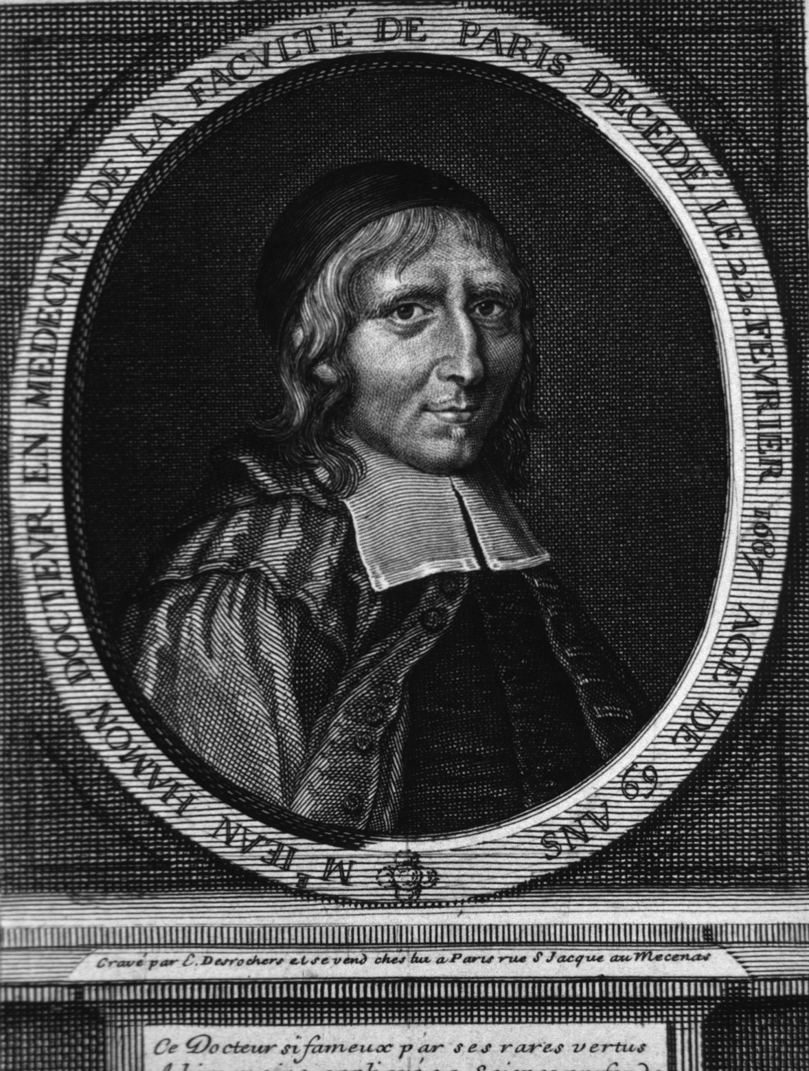 Portrait de Jean Hamon (mort en 1687)